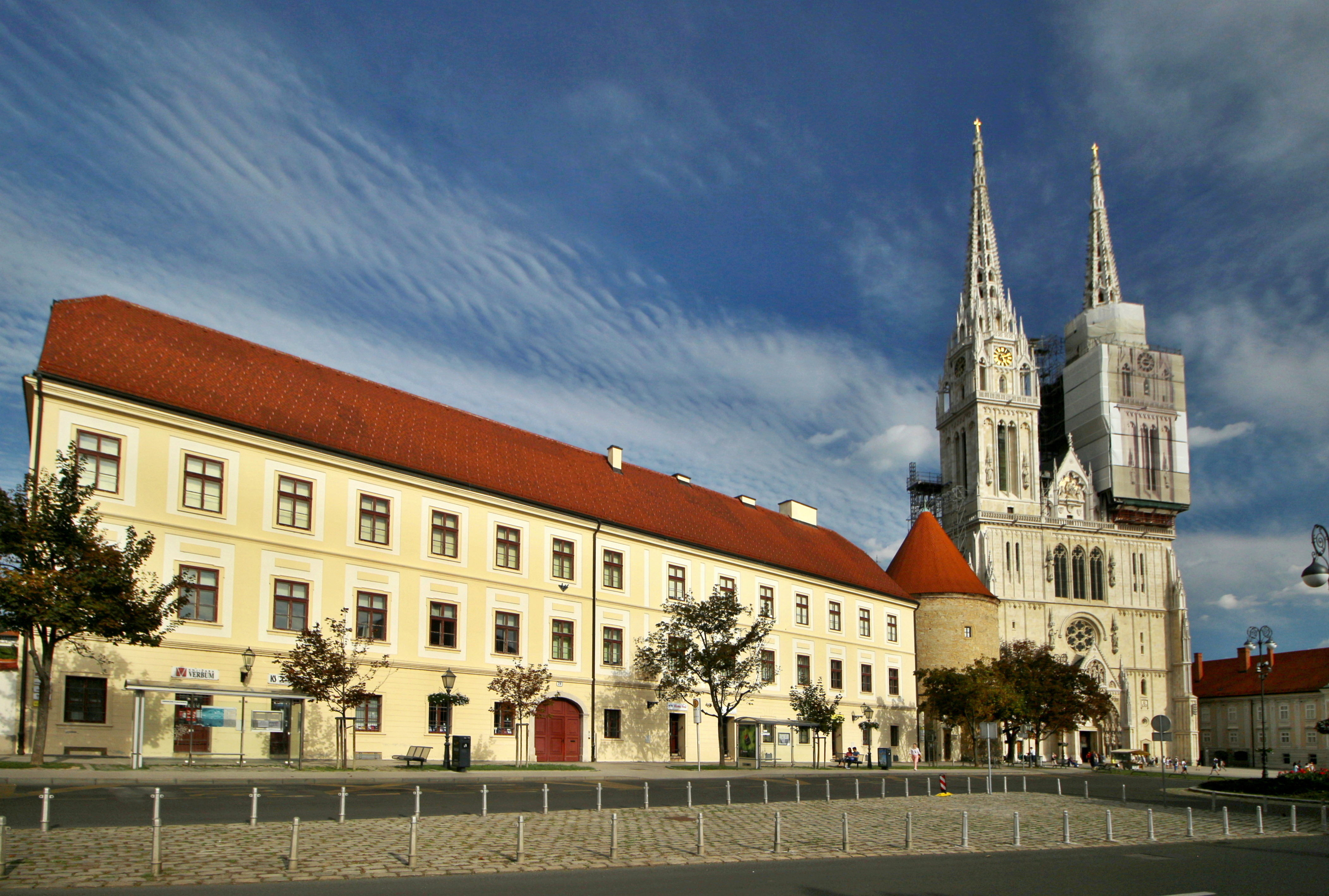 Záhřeb, Kapitol, katedrála a okolí